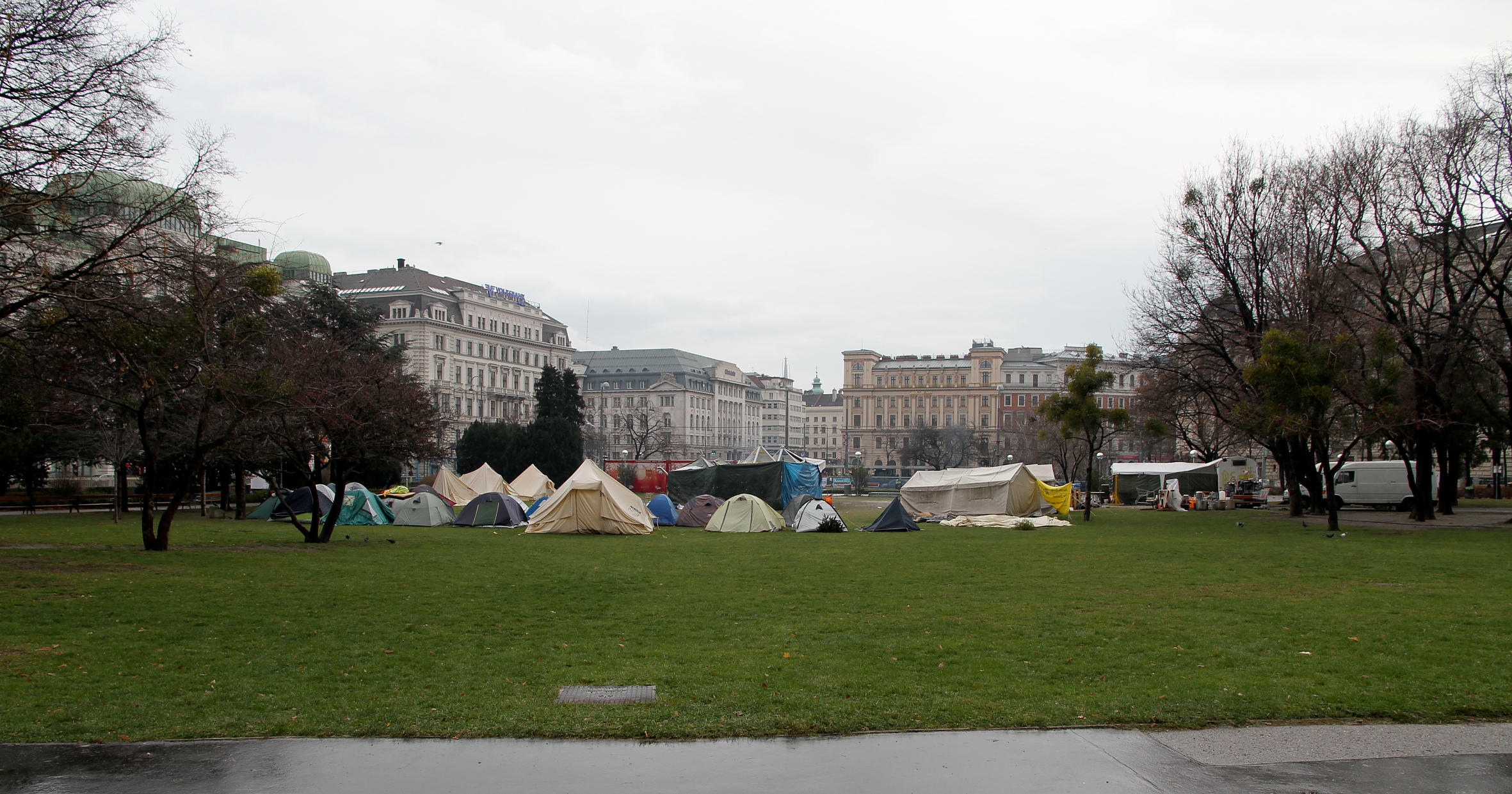 Zeltlager (Dezember 2012) im Sigmund-Freud-Park in Wien im Zuge des Refugee Protest Camp Vienna.